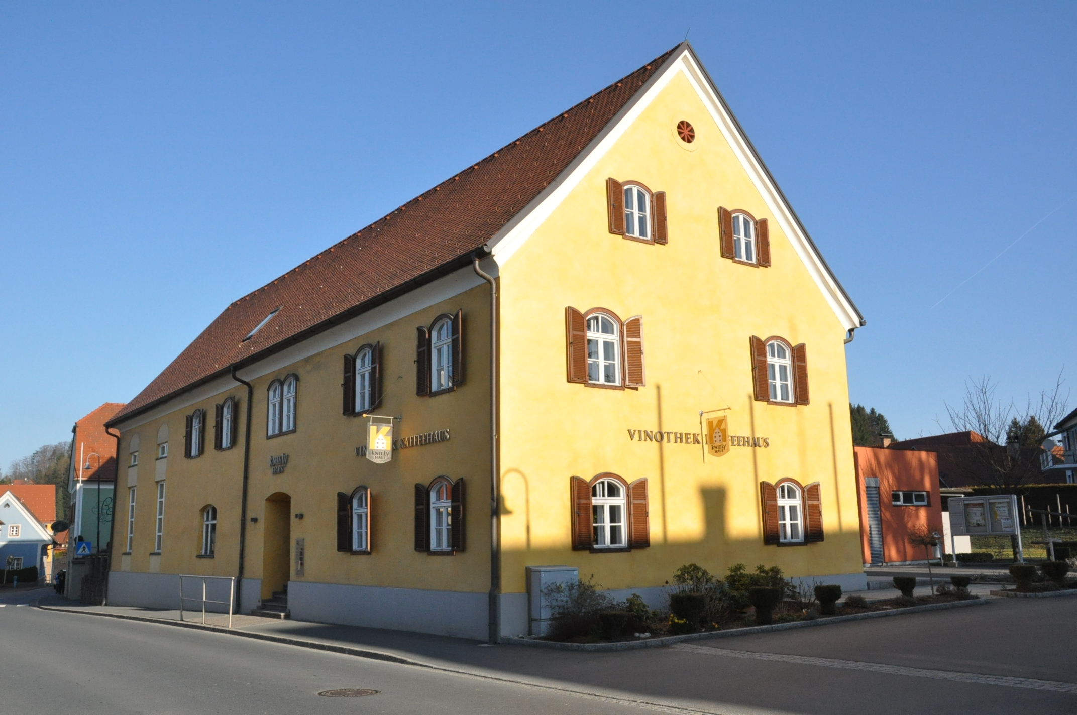 Kulturzentrum Kniely-Haus